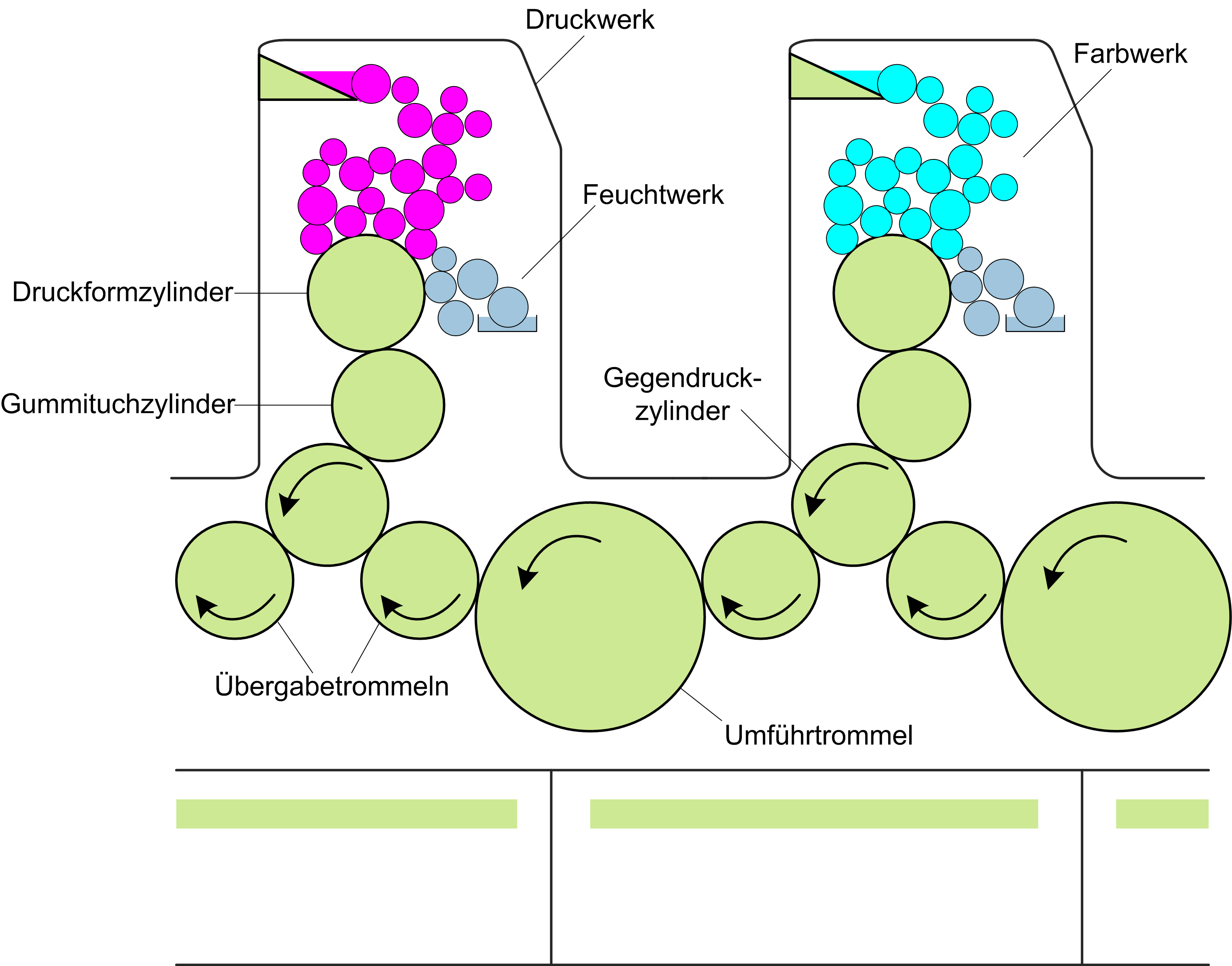 Die Abbildung zeigt eine 2-Farben-Bogenoffsetdruckmaschine in der Bauweise der Heidelberger Druckmaschinen AG.